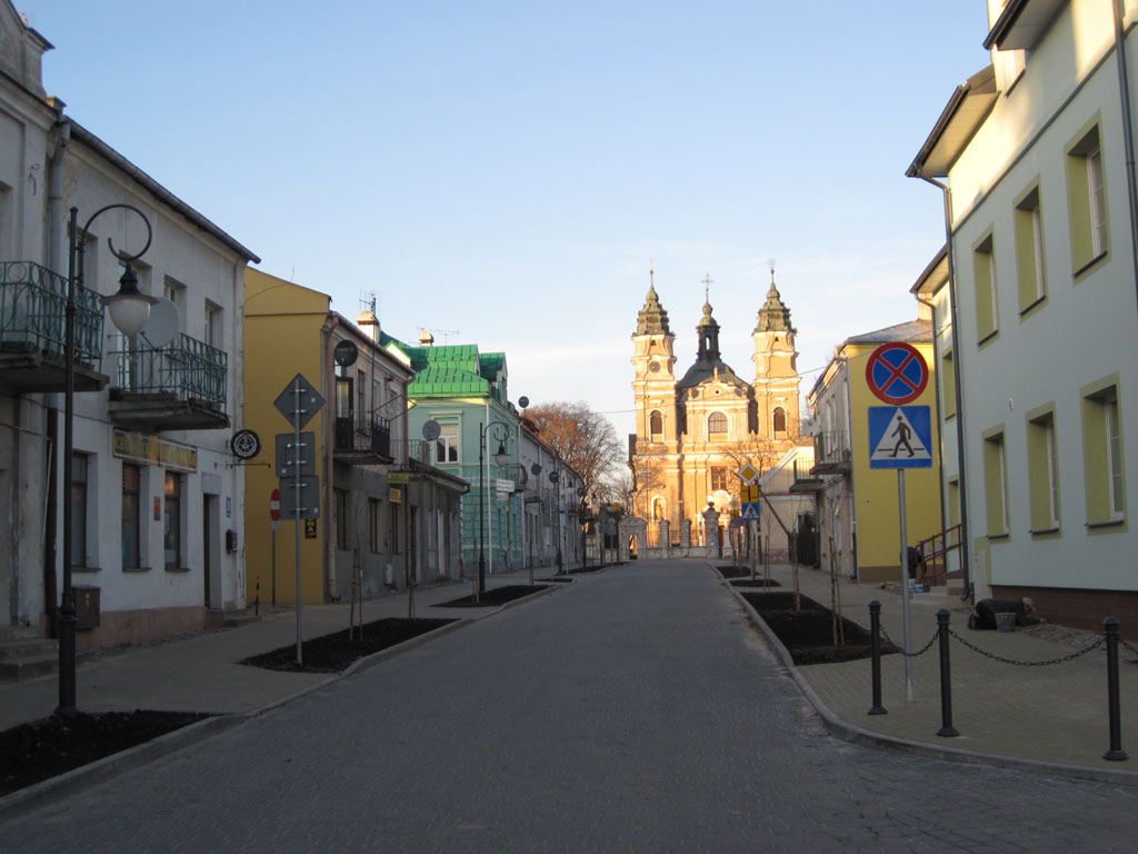 ul. Kościelna